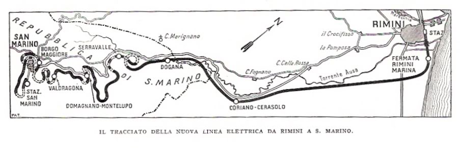 Tracciato Rimini-San Marino